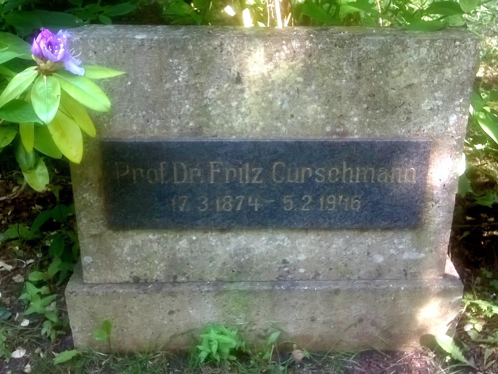 Grabstein Fritz Curschmann (1974-1946) auf dem Alten Friedhof in Greifswald